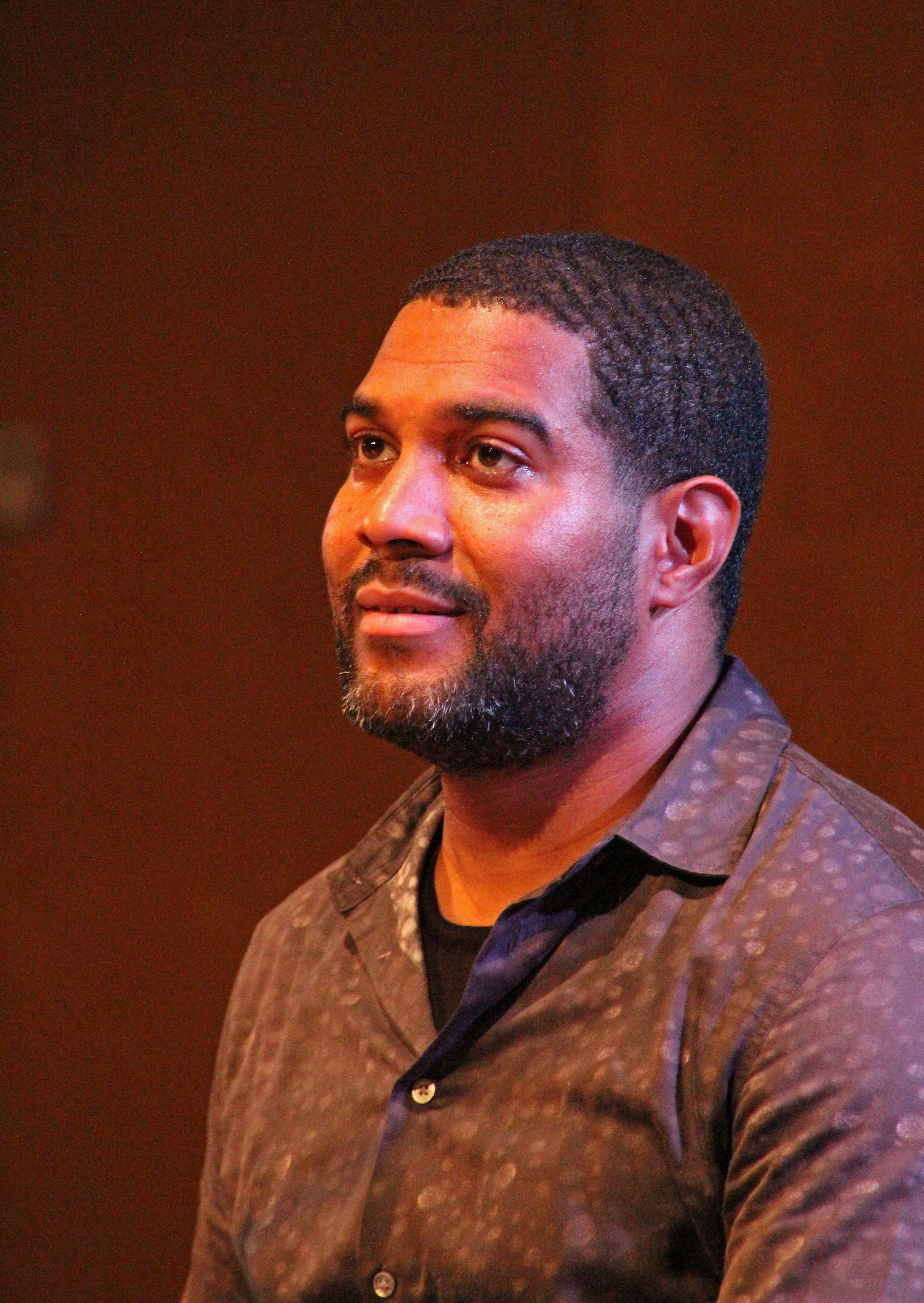 Bildinhalt: Der Schlagzeuger Damion Reid bei einem Auftritt des Mark Turner Quartet in Frankfurt am Main Aufnahmeort: Frankfurt am Main, Deutschland Die dargestellte Person wurde bei einem öffentlichen Auftritt fotografiert.